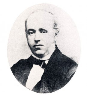 Louis Carrier, premier maire de Lévis de 1861 à 1870.